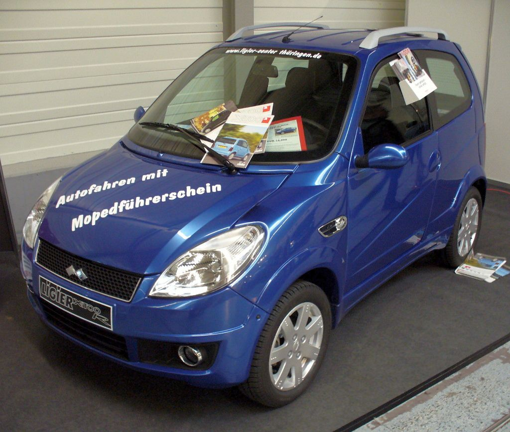 Ligier X-TOO R